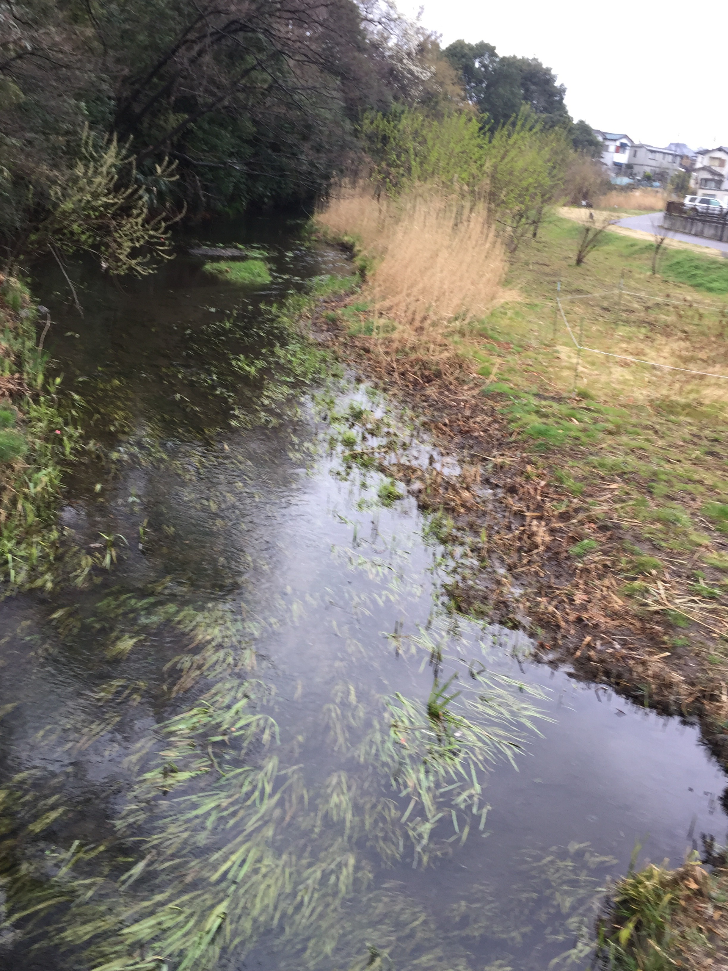 東京都東久留米市の落合川